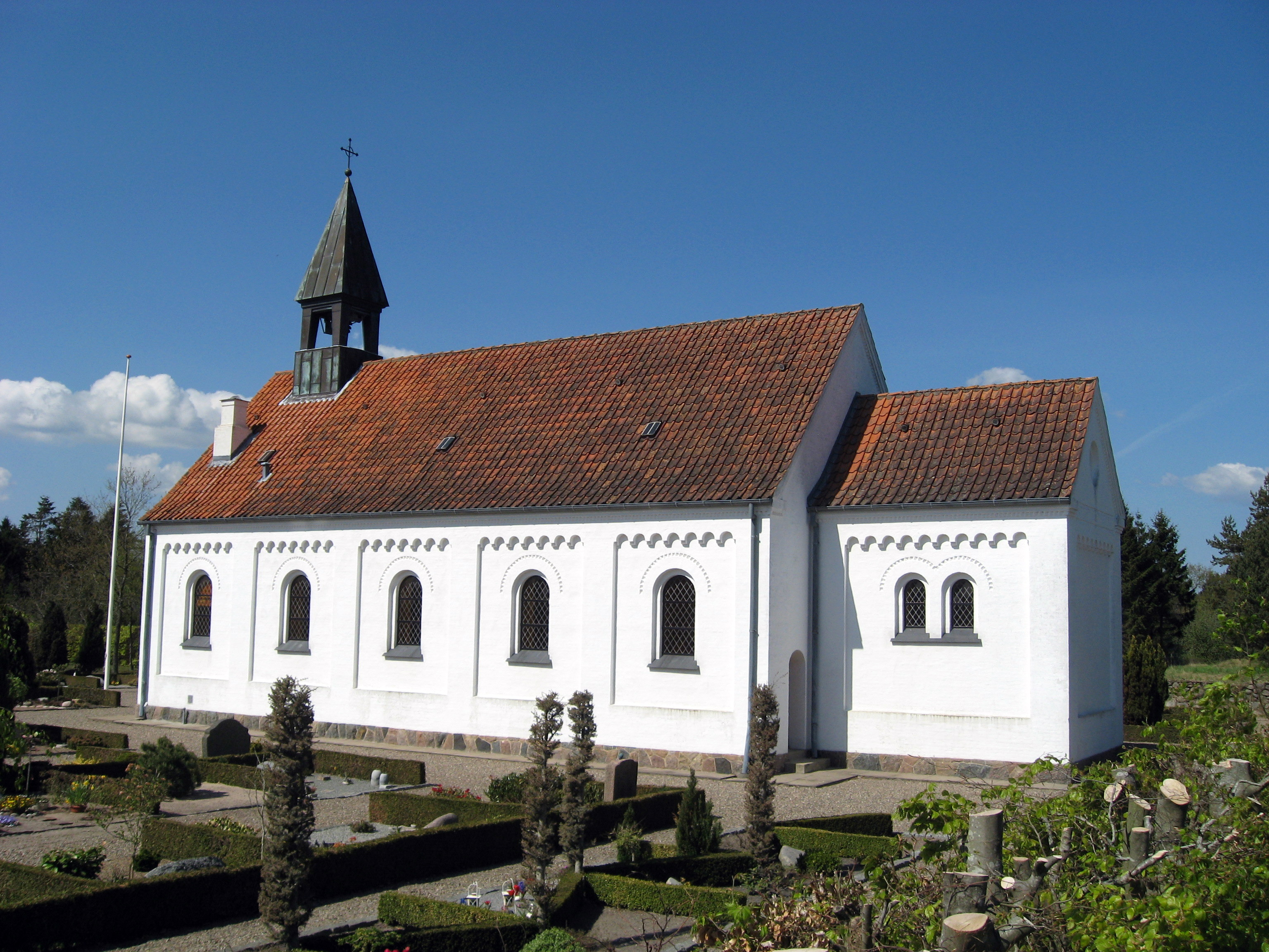 Melholt Kirke, Brønderslev Kommune